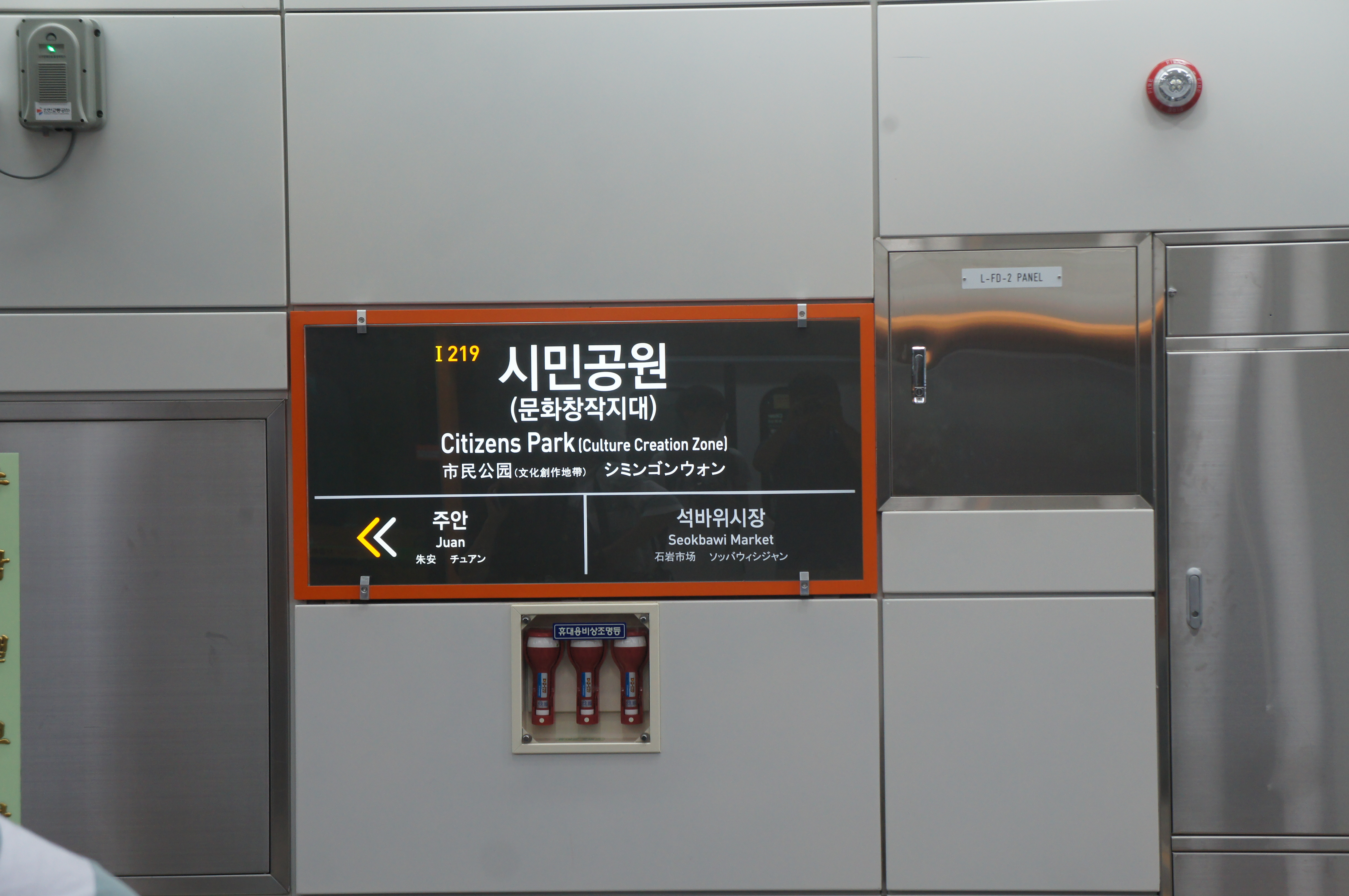 시민공원역 역명판